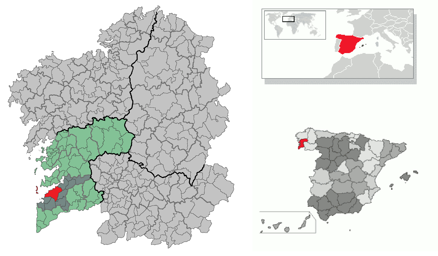 Municipio de Vigo respecto a la provincia de Pontevedra, al país de España y al continente de Europa